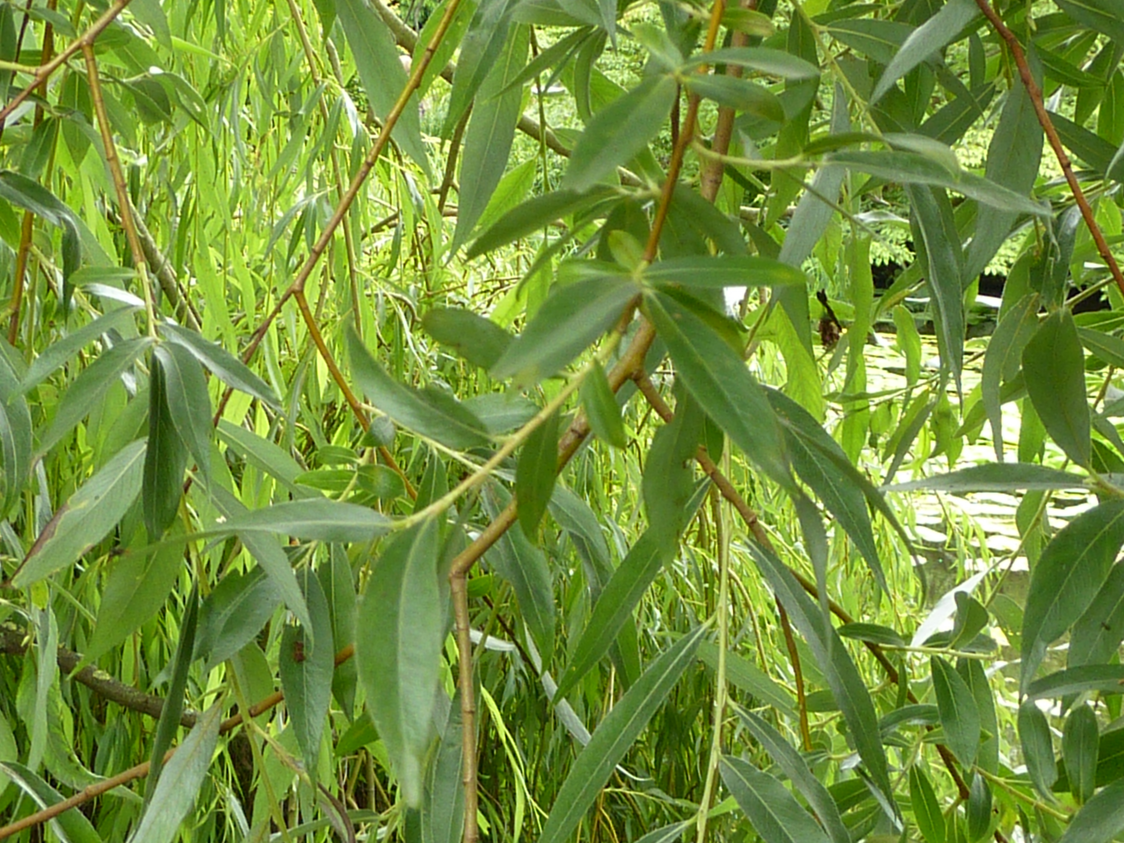 Salix alba 'Vitellina'